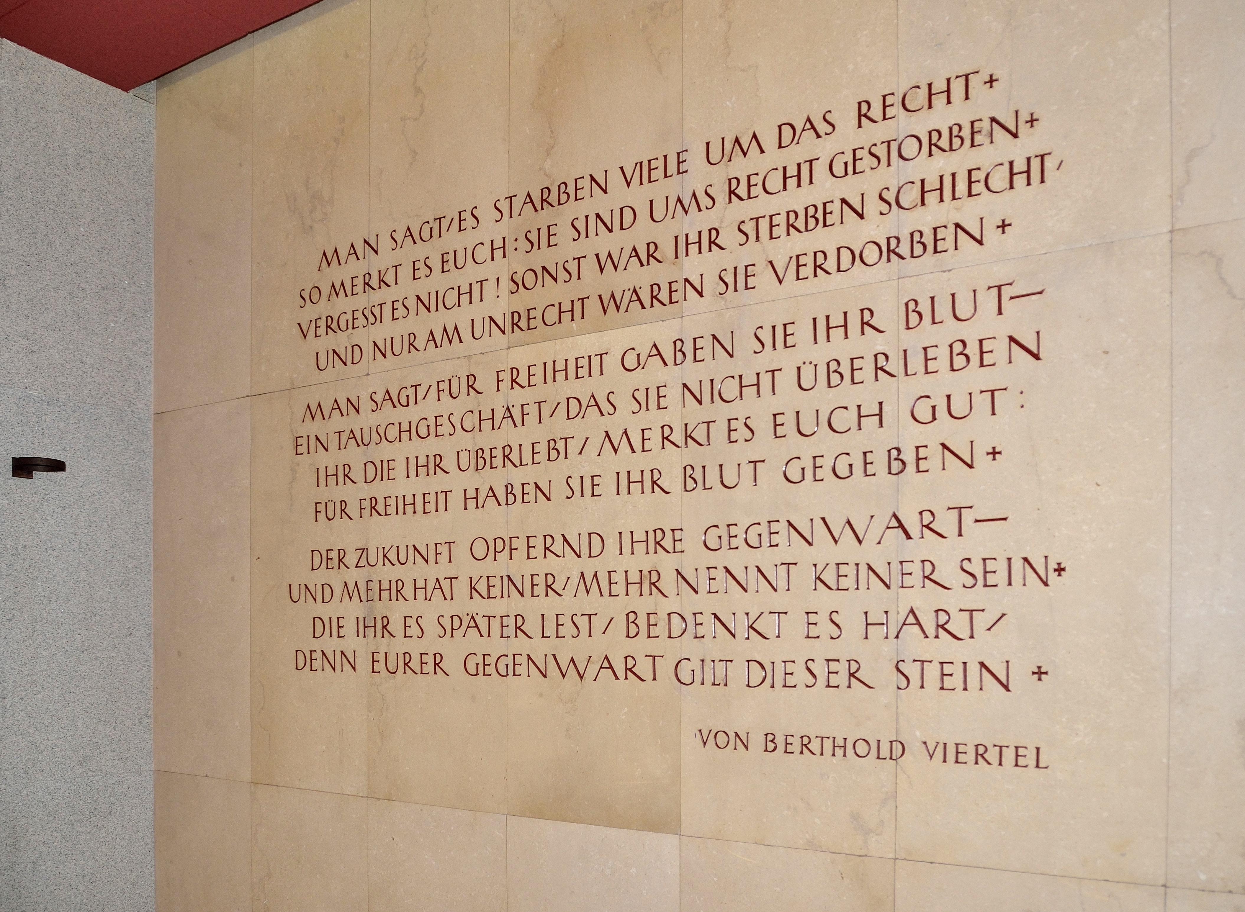 Die Gedenkstätte für die Opfer des österreichischen Freiheitskampfes 1938 - 1945 im Leopold-Figl-Hof in der Inneren Stadt in Wien. An der Wand rechts ein Text von Berthold Viertel (1885-1953).